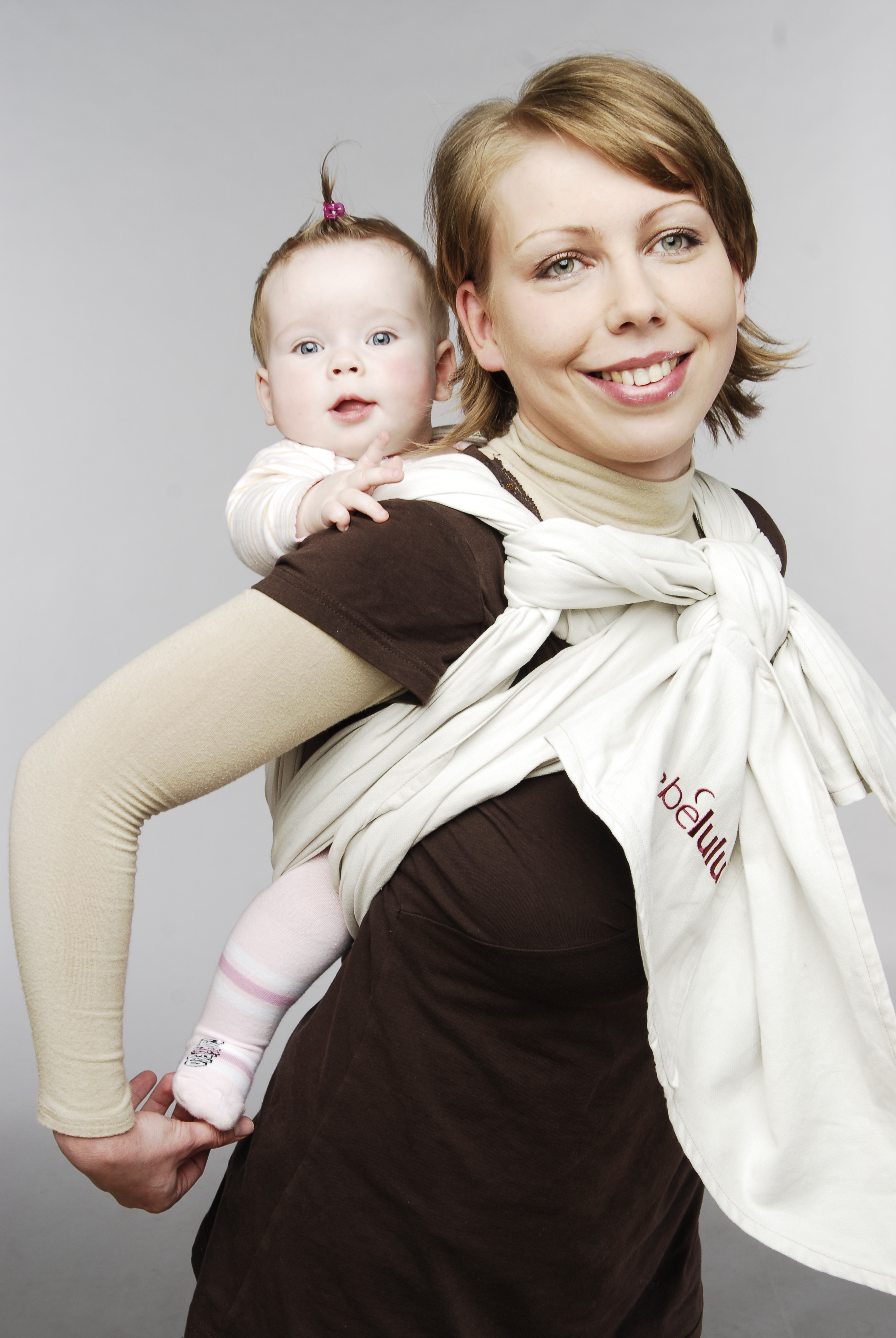 zdjęcie w chuście na plecach